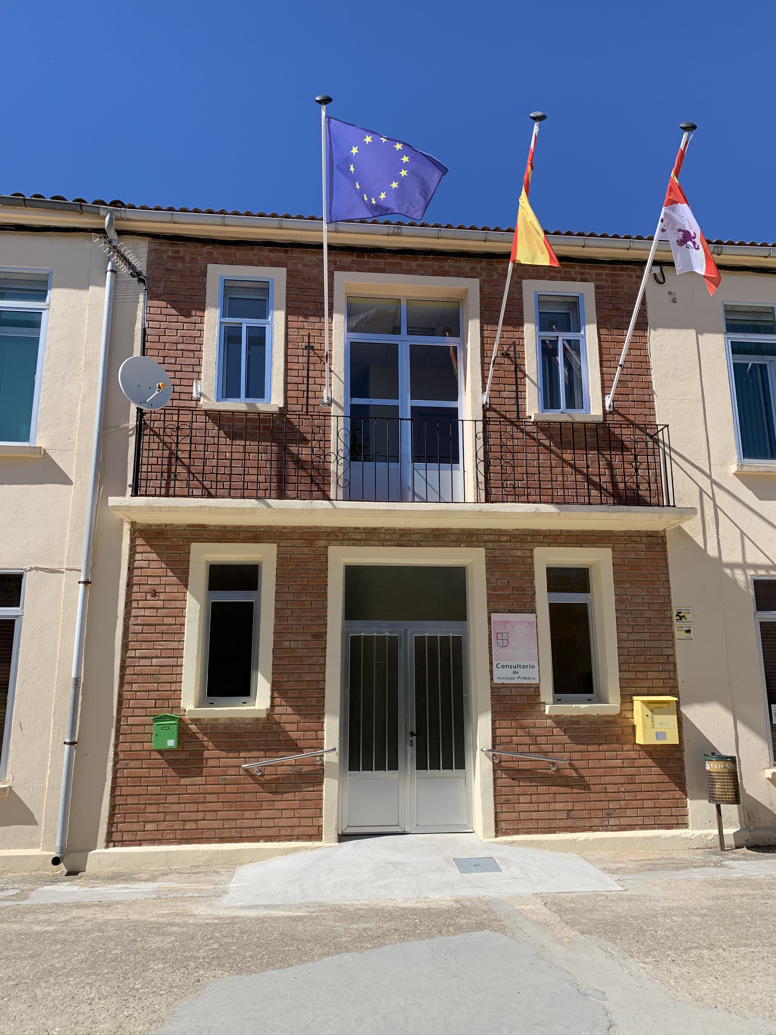 Antiguas escuelas de Pinilla Trasmonte, ocupadas en parte por el Ayuntamiento.